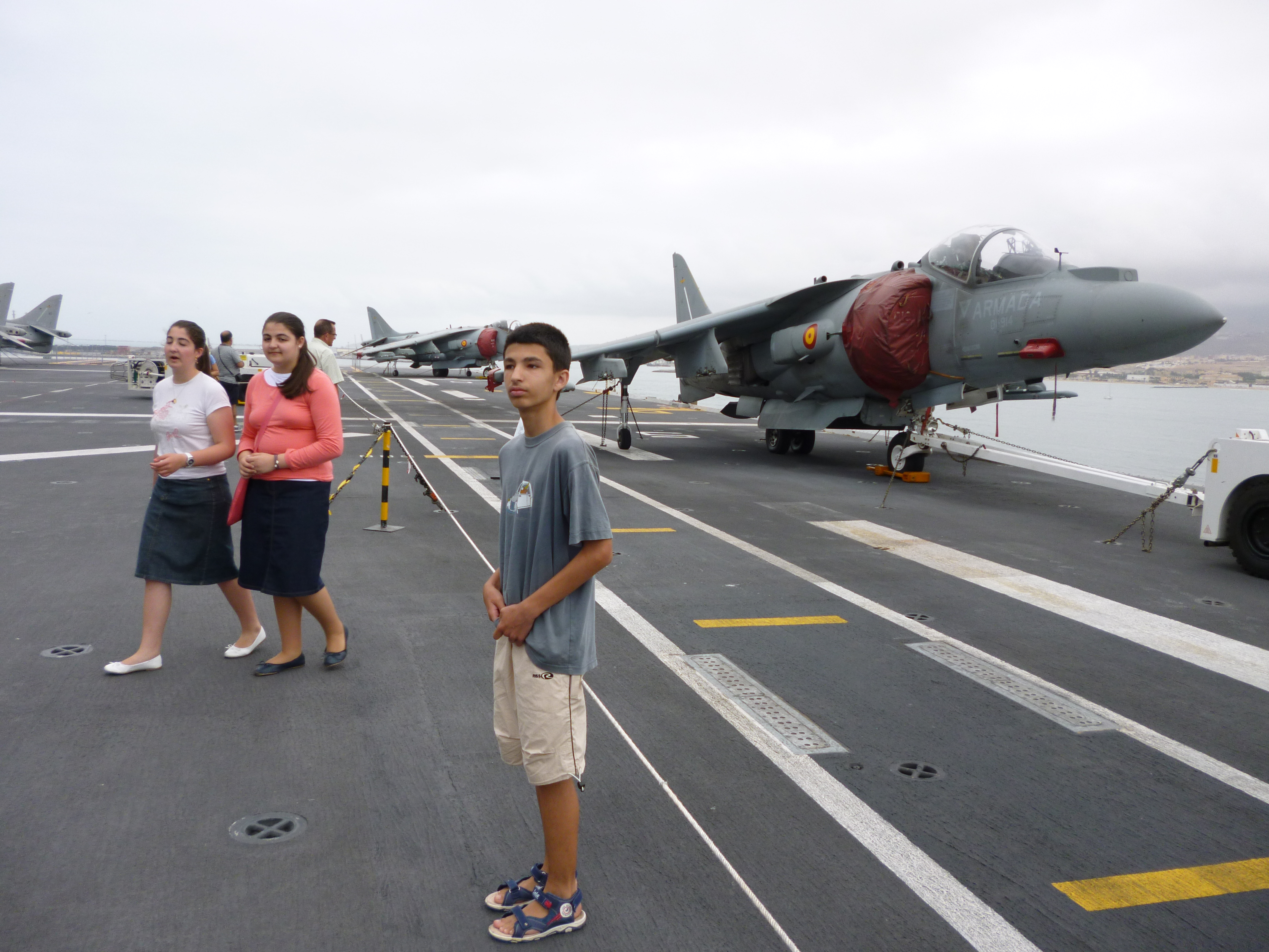 Juan Carlos I (L-61) en Melilla